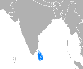 Donde es mayoritario Donde es minoritario